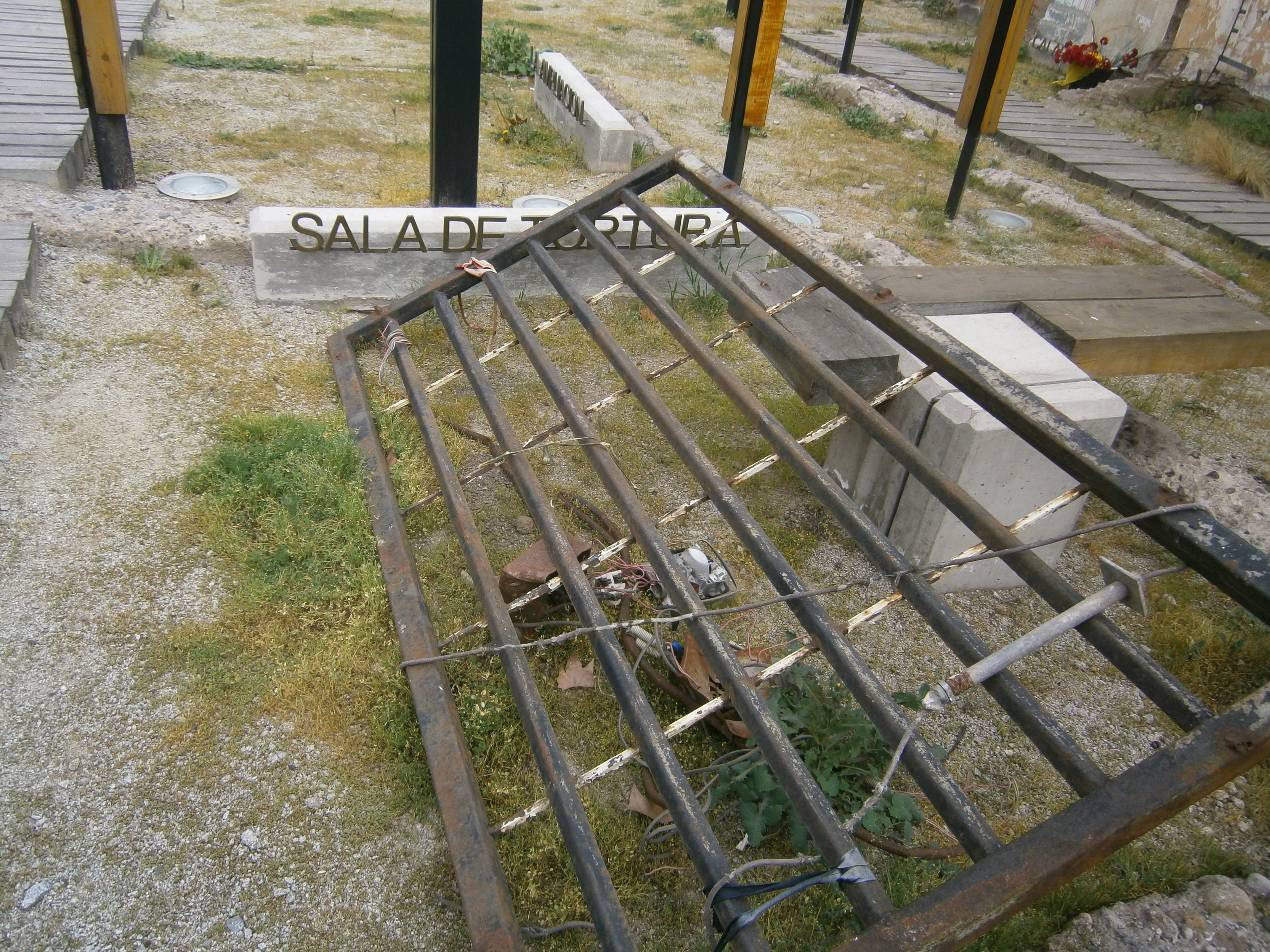 Sitio histórico ubicado en Av. José Domingo Cañas Nº 1367 This is a photo of a national monument in Chile: 481